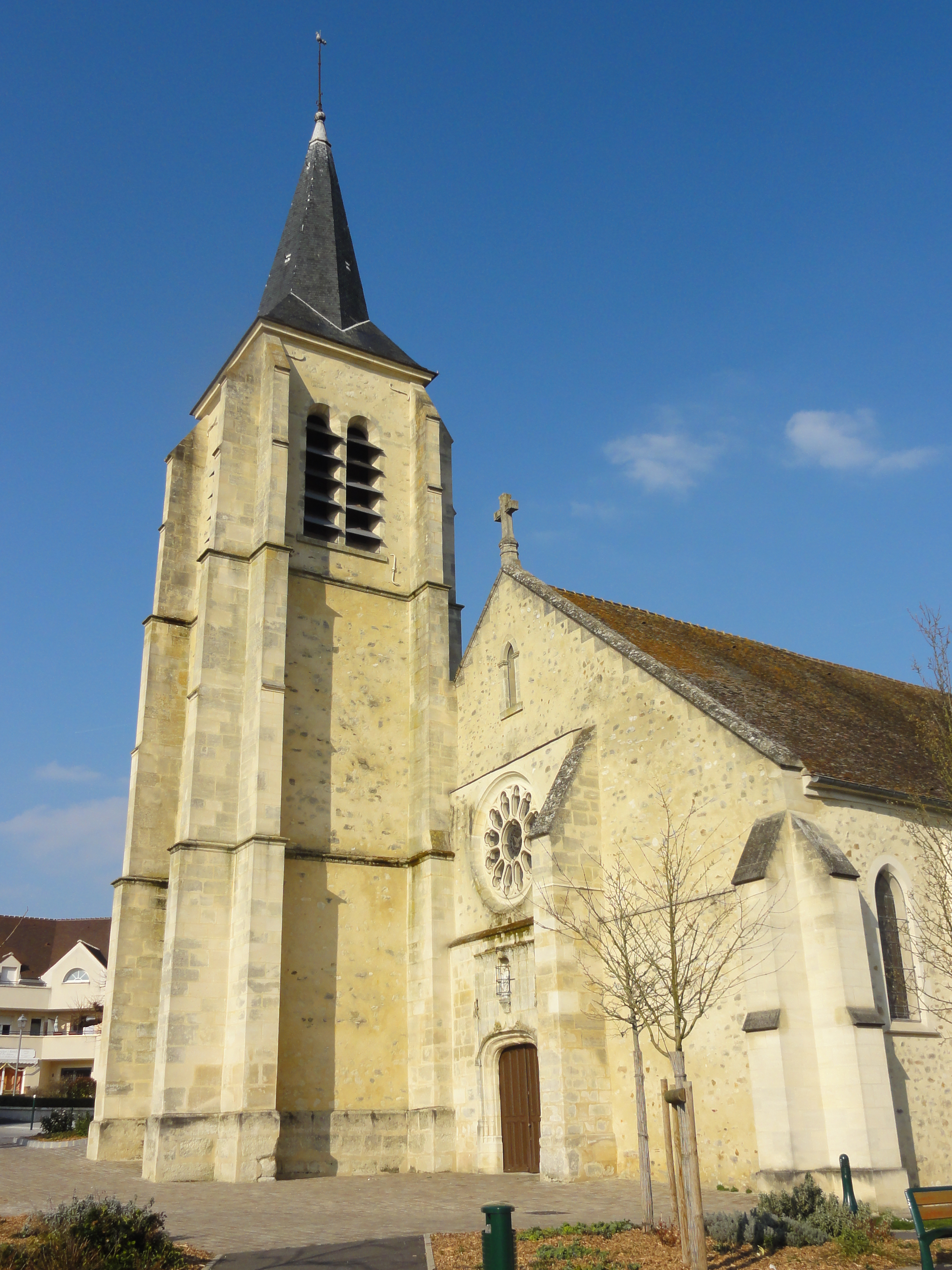 Église Saint-Pierre et Saint-Paul de Vémars (voir titre).